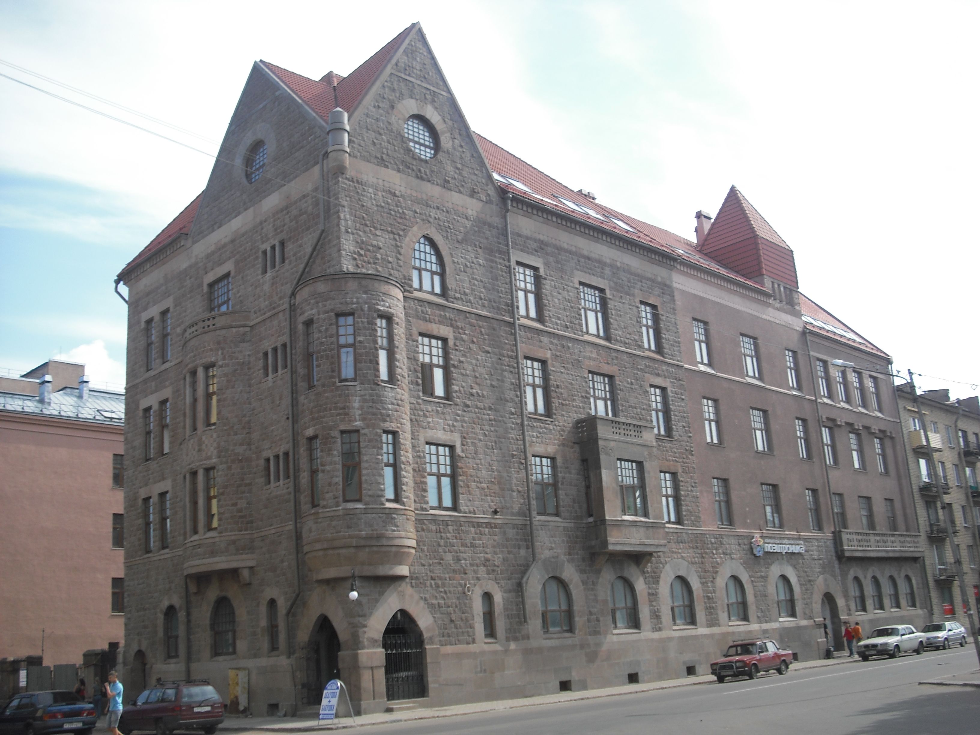 Доходный дом торговой фирмы «Хякли, Лаллукка и К°» в Выборге